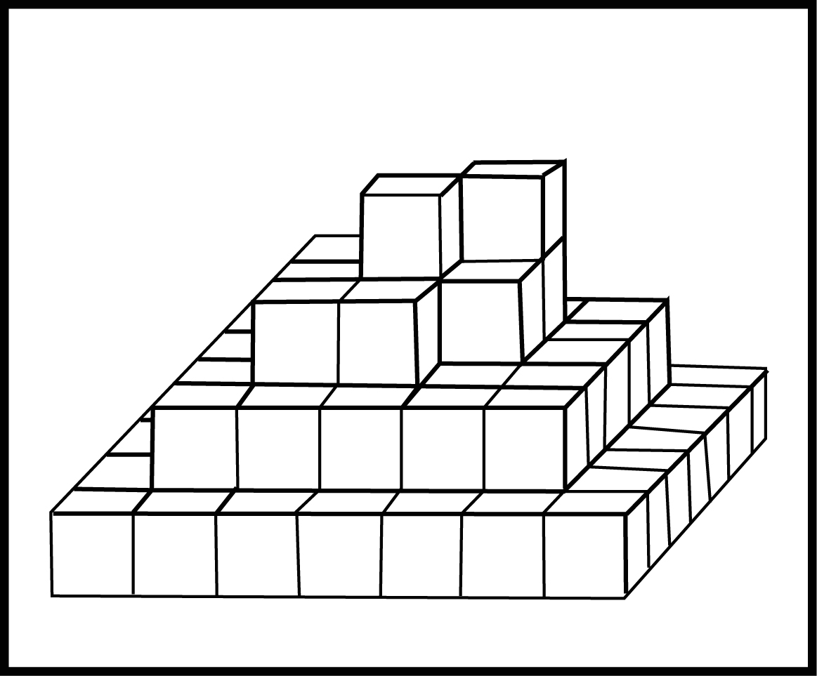 voxel